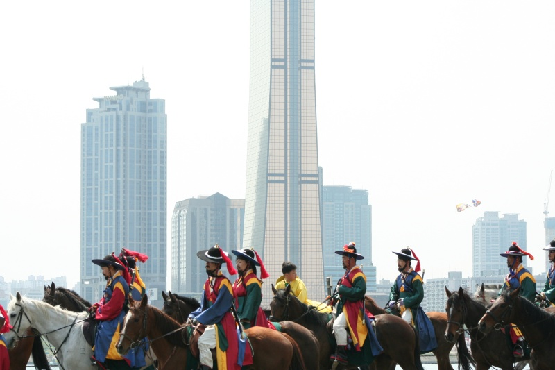 Hi.Seoul.Festival 2007